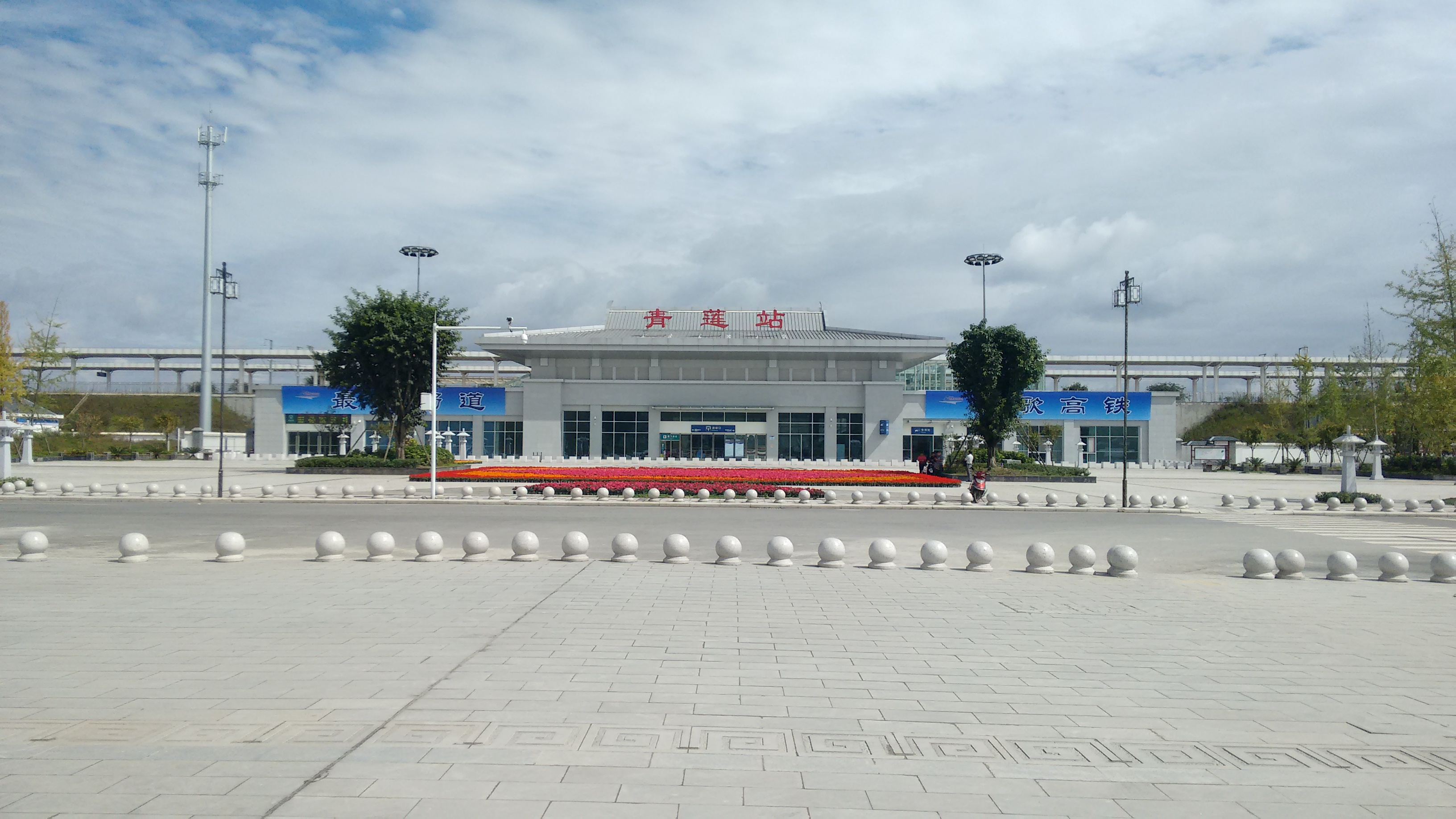 使用MOTO G LTE在日间拍摄，运用了HDR